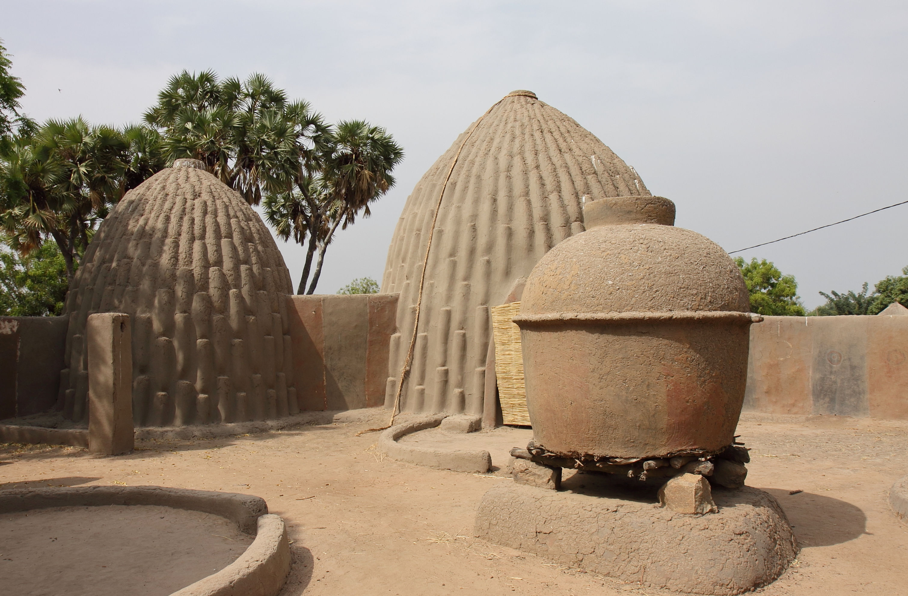 Habitation mousgoum de Pouss dans l’extrême nord ; jarre à mil au centre de la cour